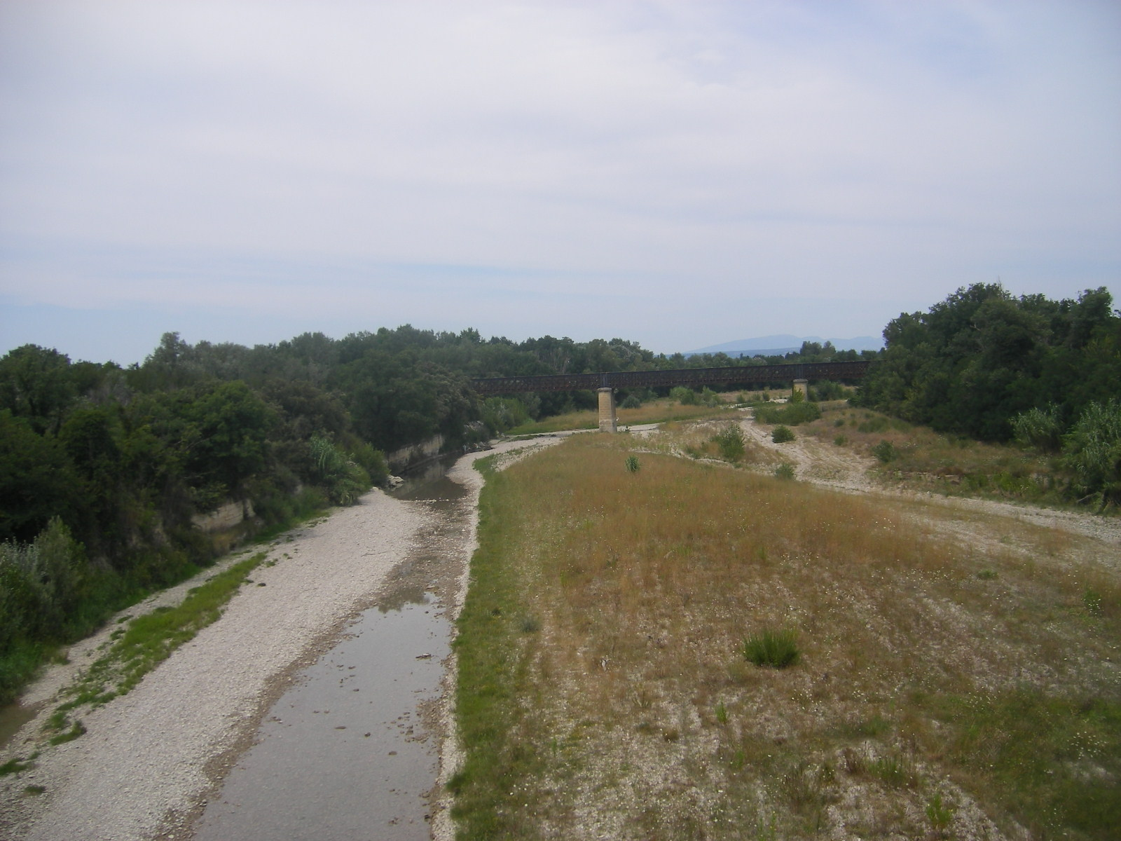 The Ouvèze river at crossing Carpentras-Orange route near Jonquières